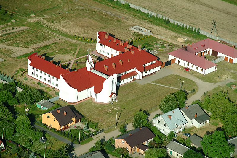 Klasztor Karmelitanek Bosych w Nowych Osinach